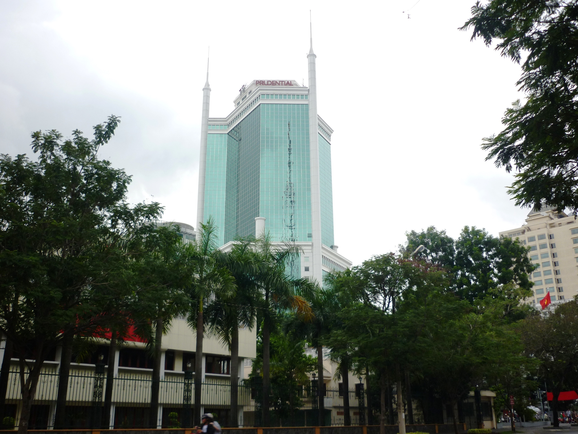 Tòa nhà Saigon Trade Center vươn mình trong nắng